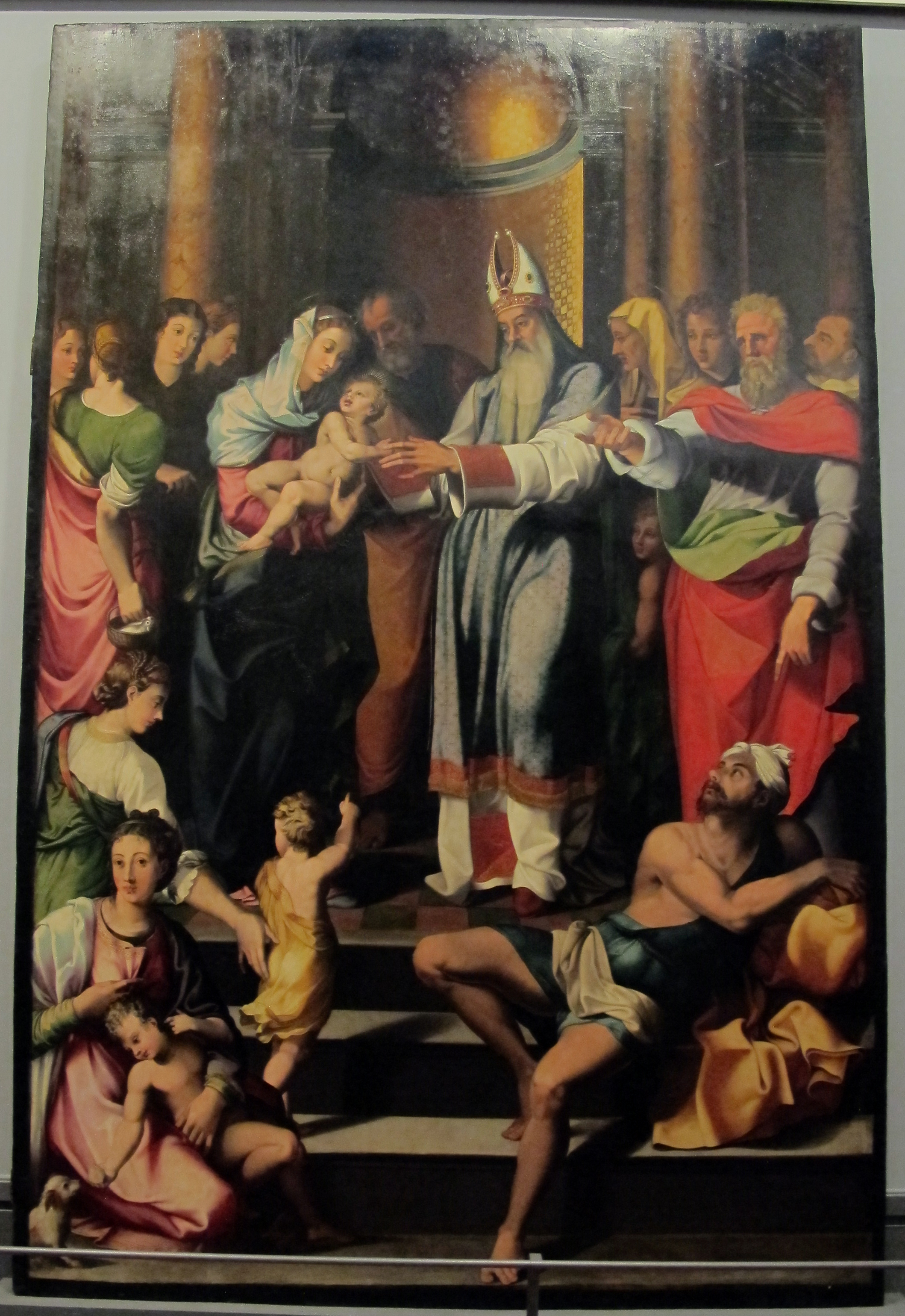 Galleria Napoletana (Museo di Capodimonte)